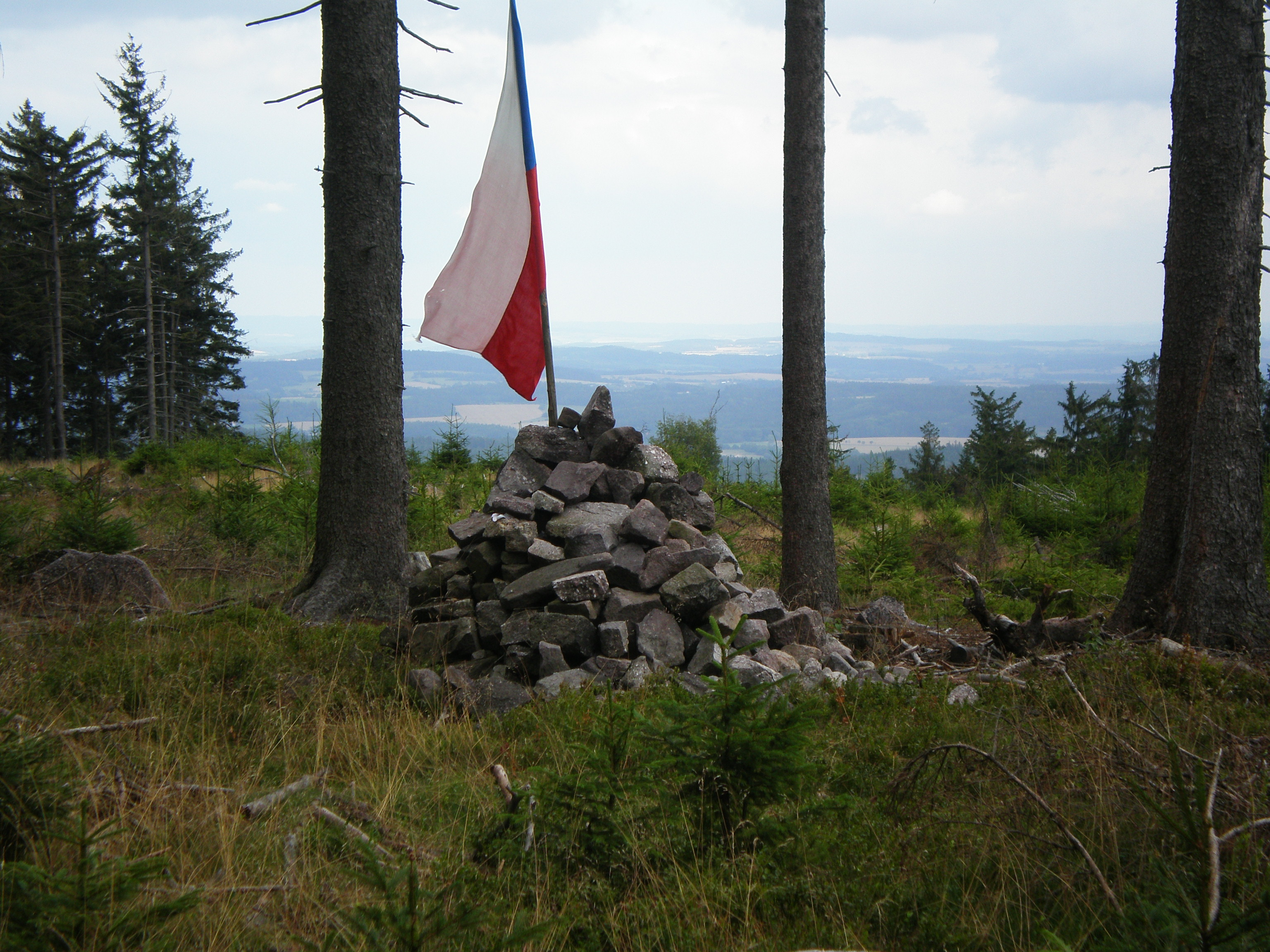 Brdce (839 m) - jeden z "odmítnutých" kandidátů stanoviště radaru americké PRO